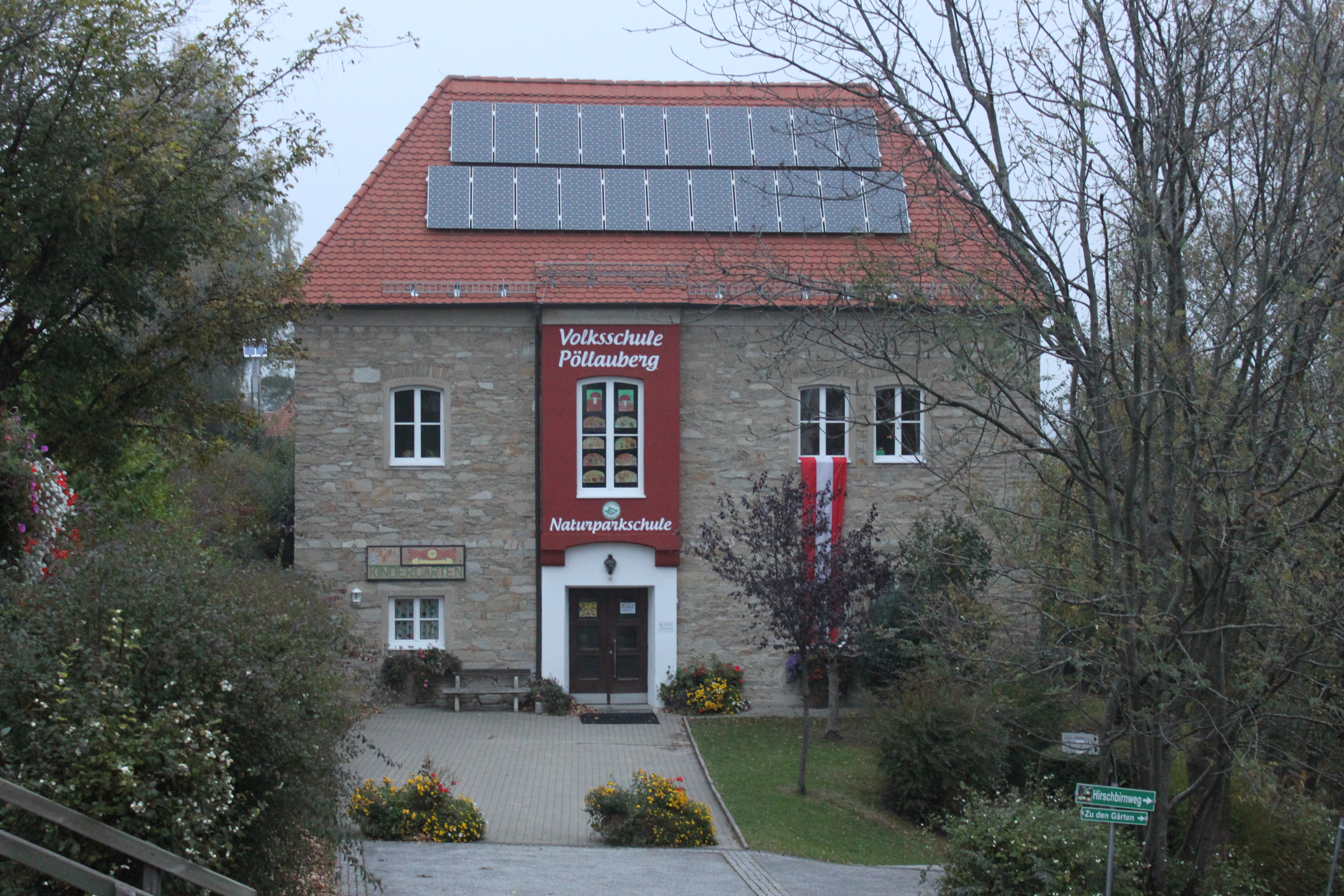 Volksschule in Pöllauberg, neu mit Aufschrift Naturparkschule